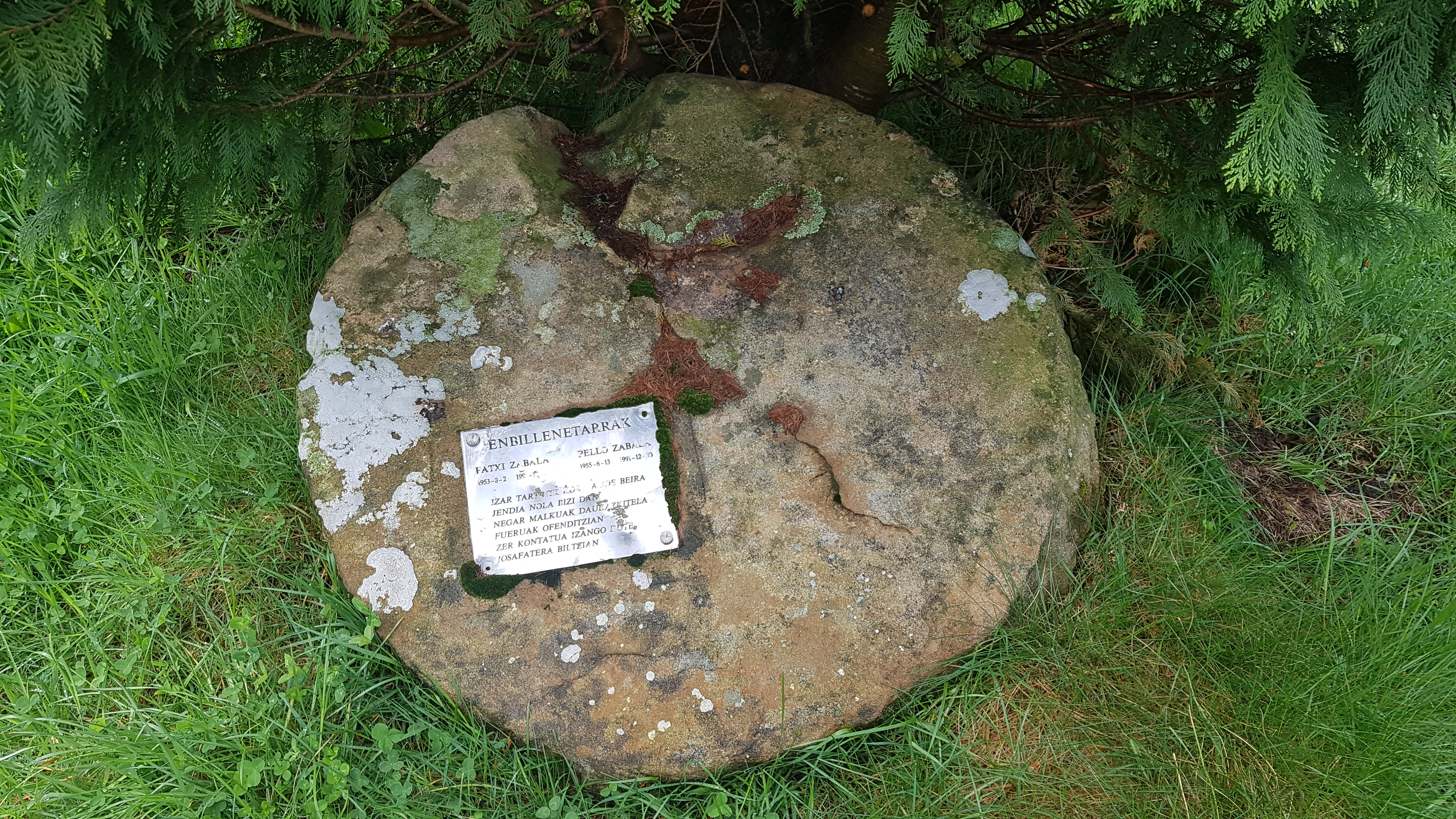 Istripuz hil ziren Usurbilgo Enbillenea baserriko Pello eta Patxi Zabalaren omenezko plaka Andatzako tontorrean dagoen errotarrian.